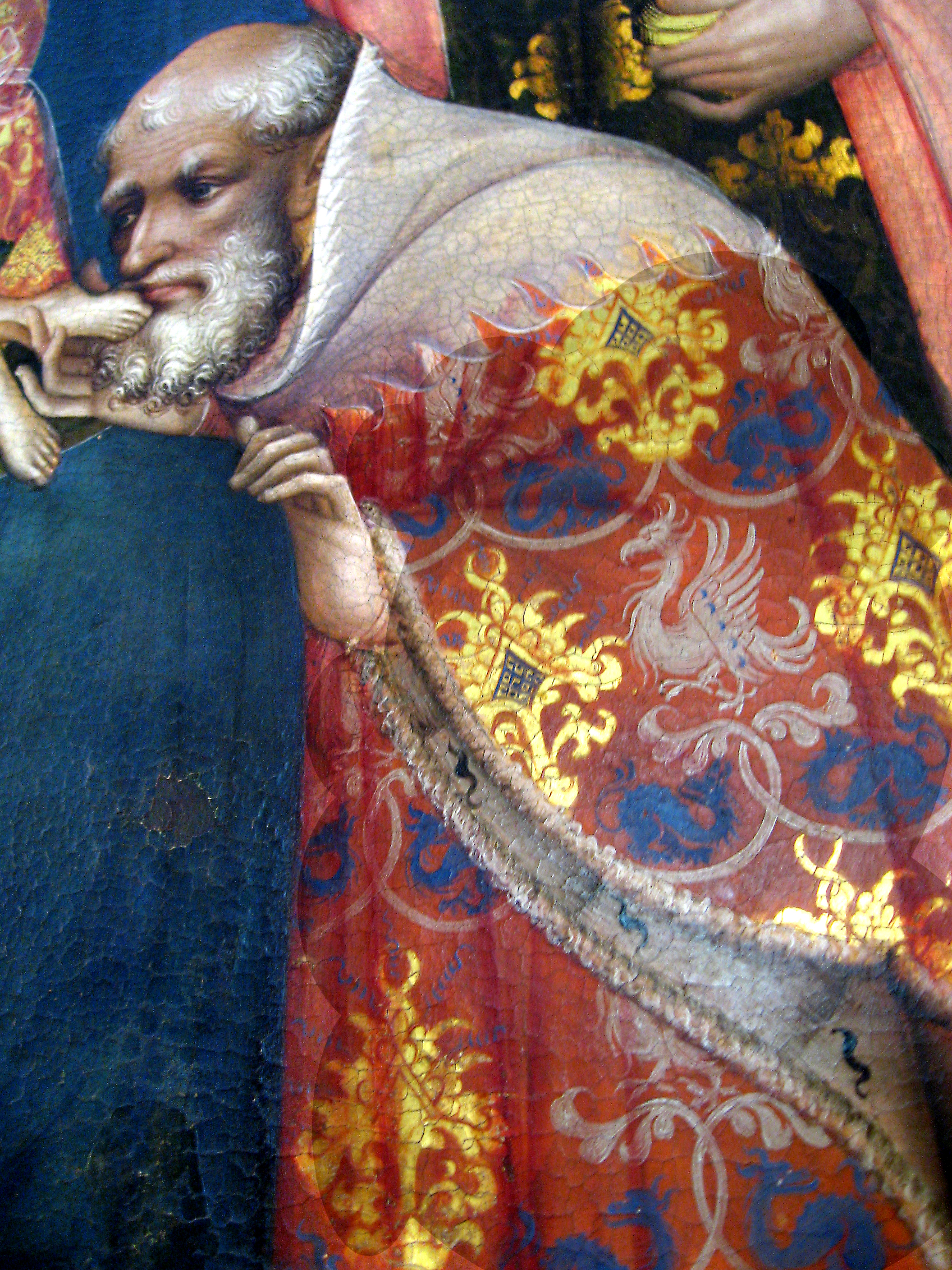 Marienkirche Dortmund, Marienaltar, Konrad von Soest, rechte Tafel, Gewand, Details